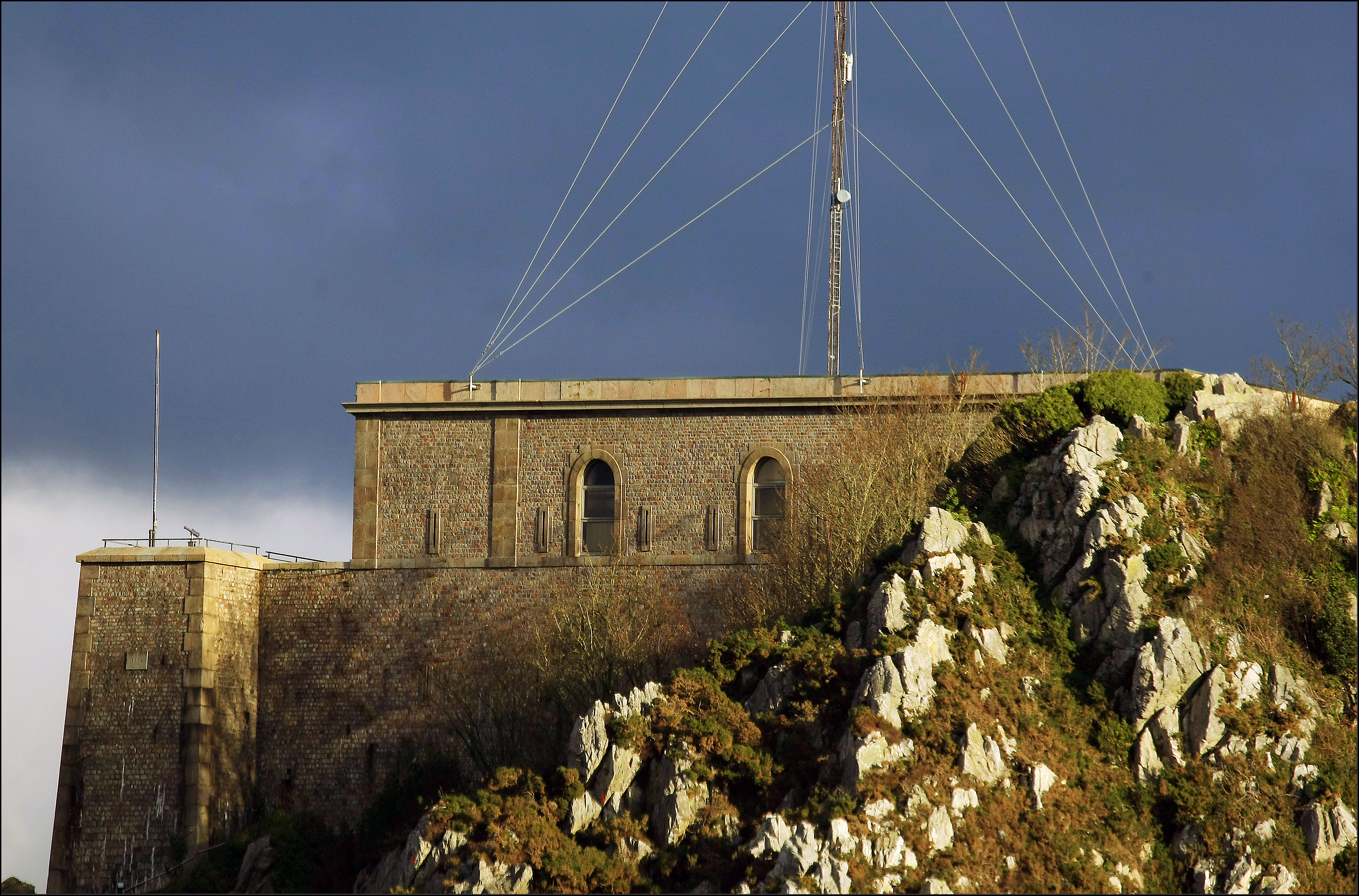 Batterie du fort du Roule